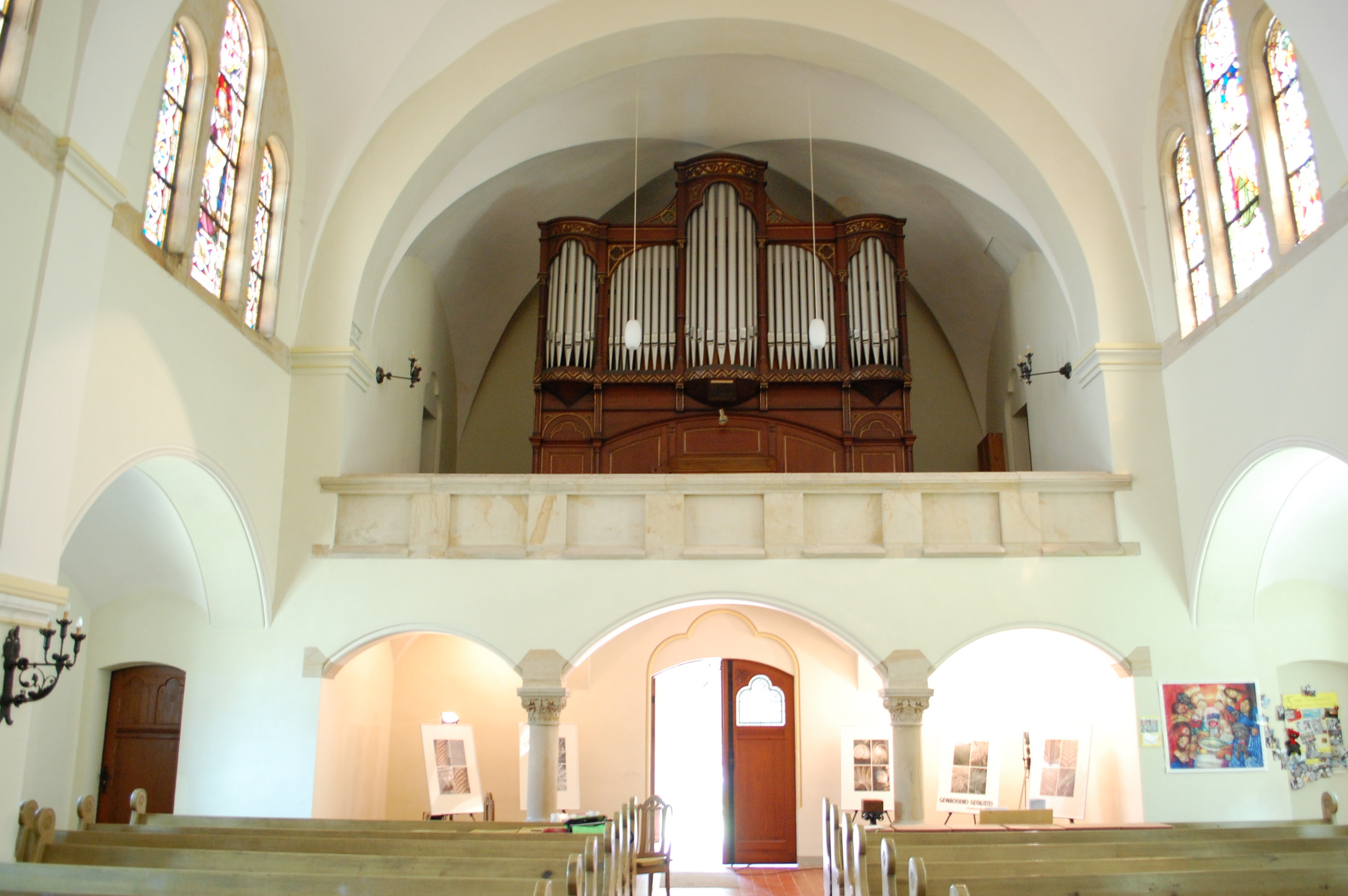 Sankt-Johannis-Kirche (Quedlinburg), Orgelempore